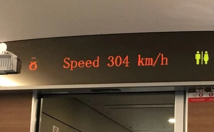 列车于京广高铁运行时的ATP限速上浮，超过线路运营速度300km/h